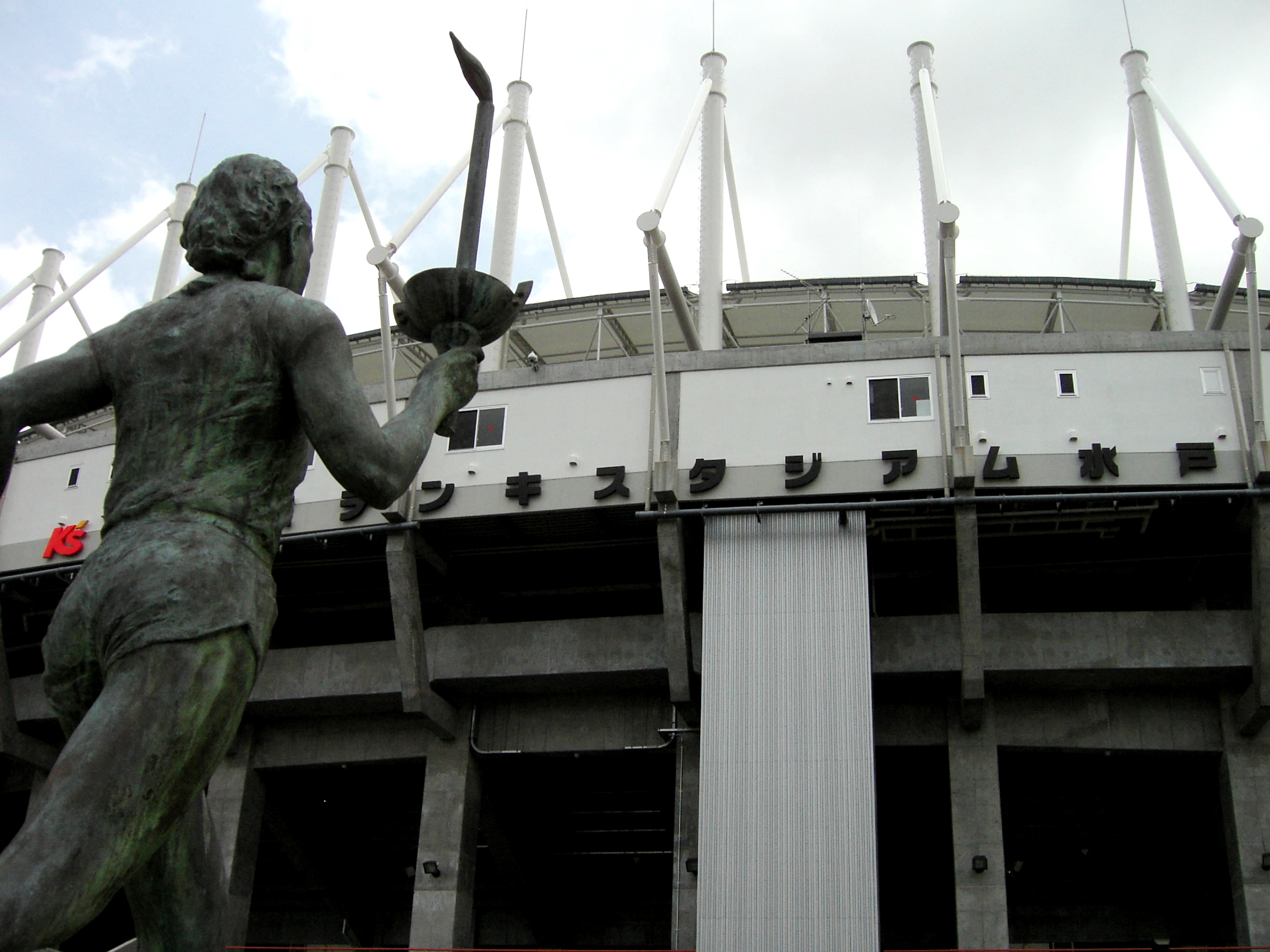 茨城県水戸市、ケーズデンキスタジアムのファサード。Panoramioより転載。